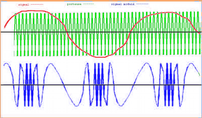 Un exemple de modulation de fréquence. En haut, le signal (en rouge) superposé avec la fréquence porteuse (en vert). En bas, le résultat du signal (en bleu) une fois modulé par la fréquence.